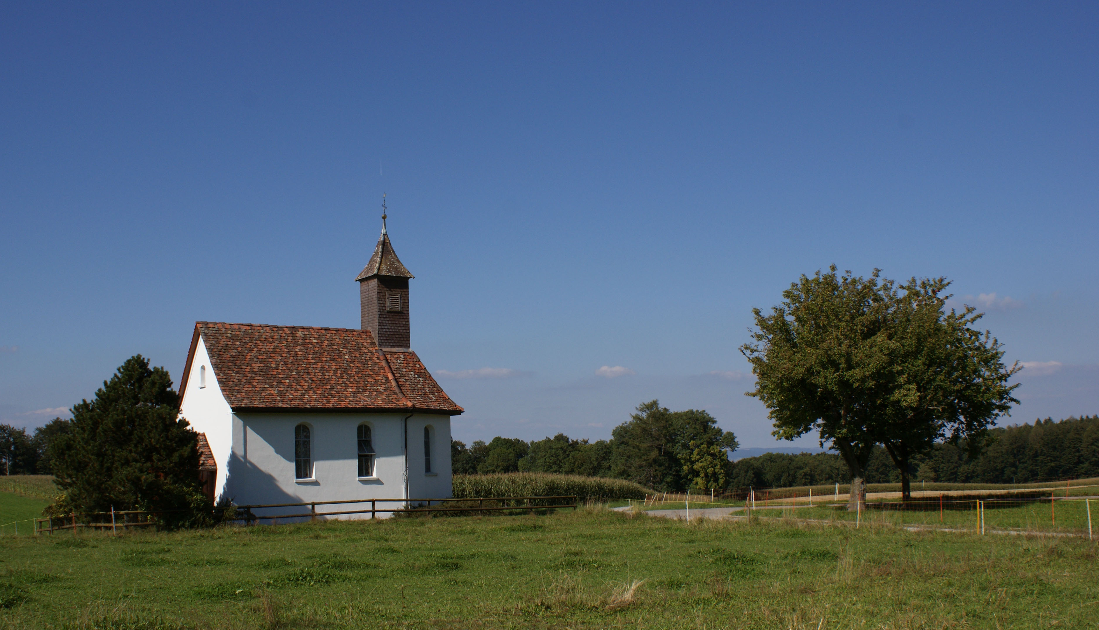 Kapelle St.Antonius, Salen-Reutenen auf dem Seerücken. EXIF Daten: SONY DSLR-A300 27.08.2008 16:16:50 1/640 s - f/10 - ISO 200 - 22 mm / 33 mm Aufnahmestandort - Höhe / Koordinaten: 710 m - 719563 / 279088 (47.651528°, 9.030083°) 47° 39′ 5.5″ N, 9° 1′ 48.3″ E